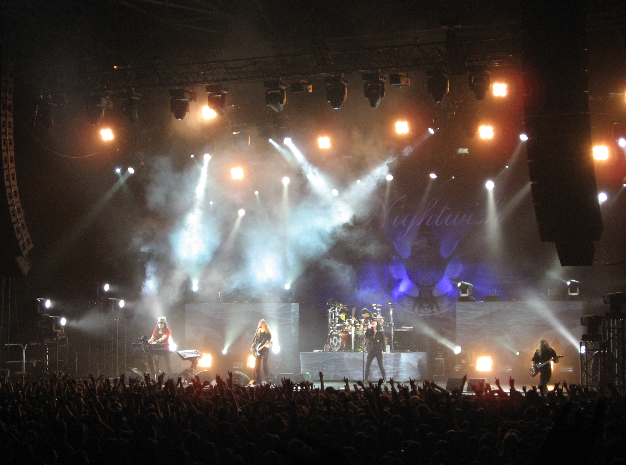 Nightwish en concert au Zénith de Paris, le 06 avril 2008.